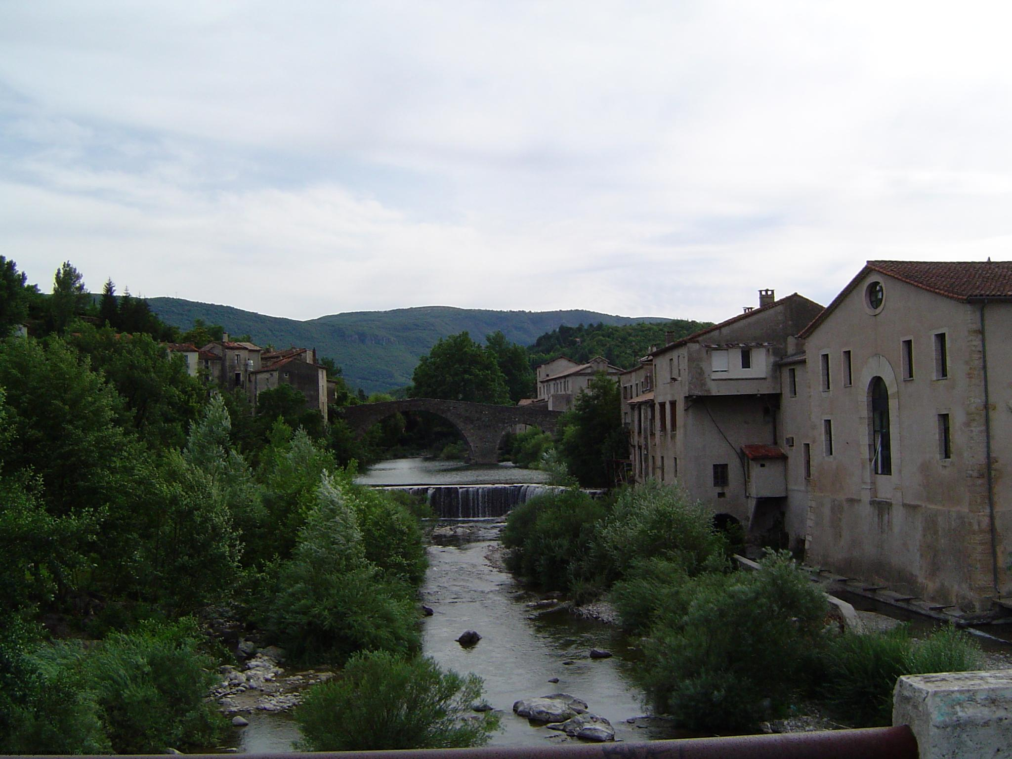 Photo du Vieux Pont au Vigan dans le Gard en France 2005. Cevenol2